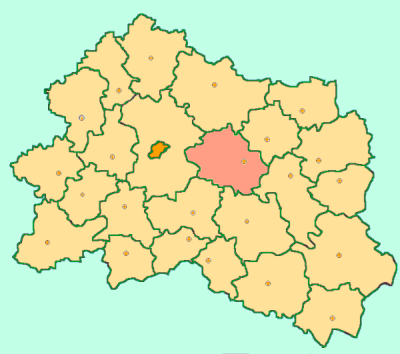 Orel Oblast map by Al Silonov Карта районов Орловской области